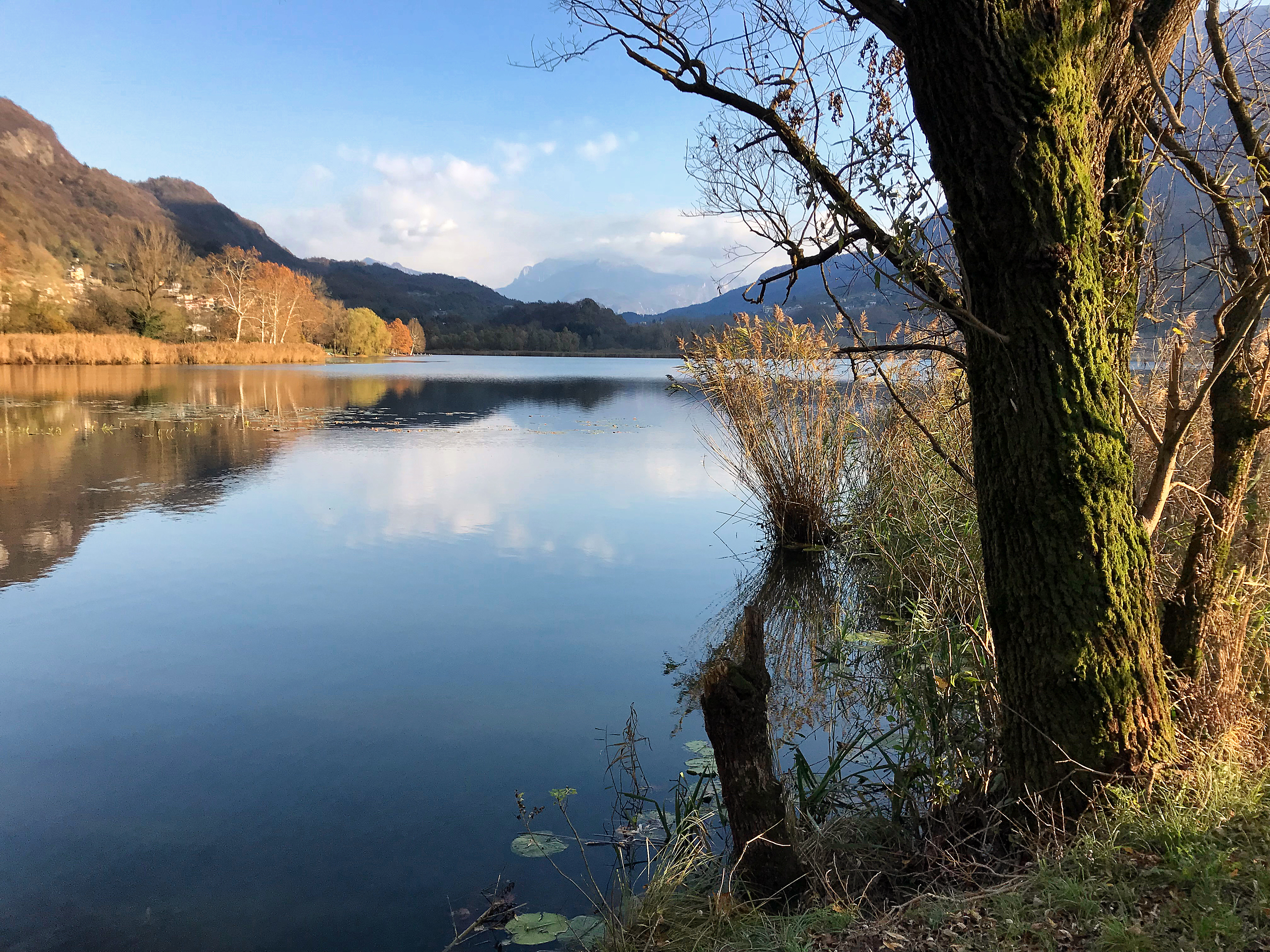 riserva naturale Lago di Piano (Q47487014)